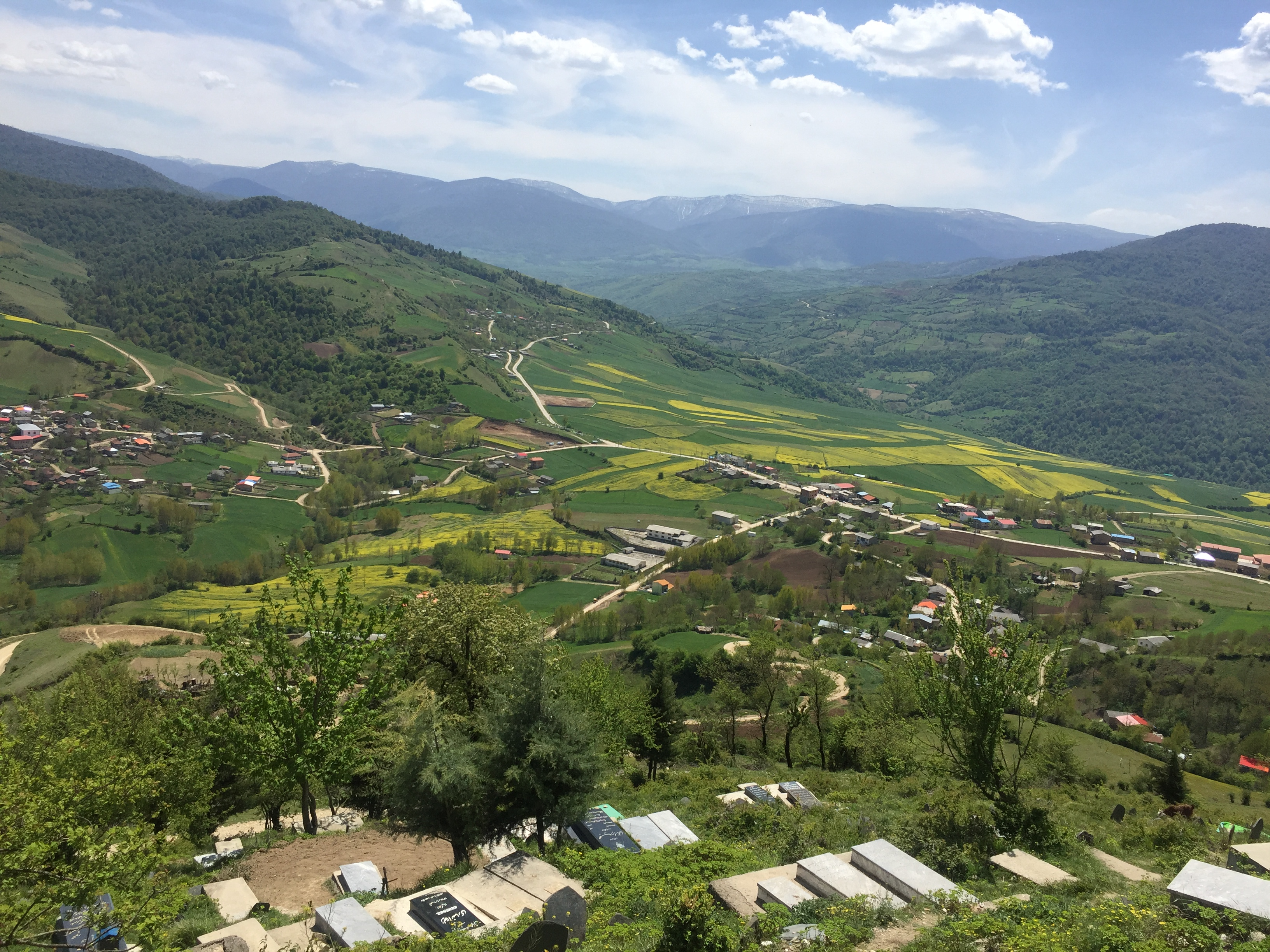 هزارجریب نکا از فرار امامزاده روستای زیارتکلا ( لَـــــیی) ۳۱ فرودین یکهزار و سیصد و نود و هفت